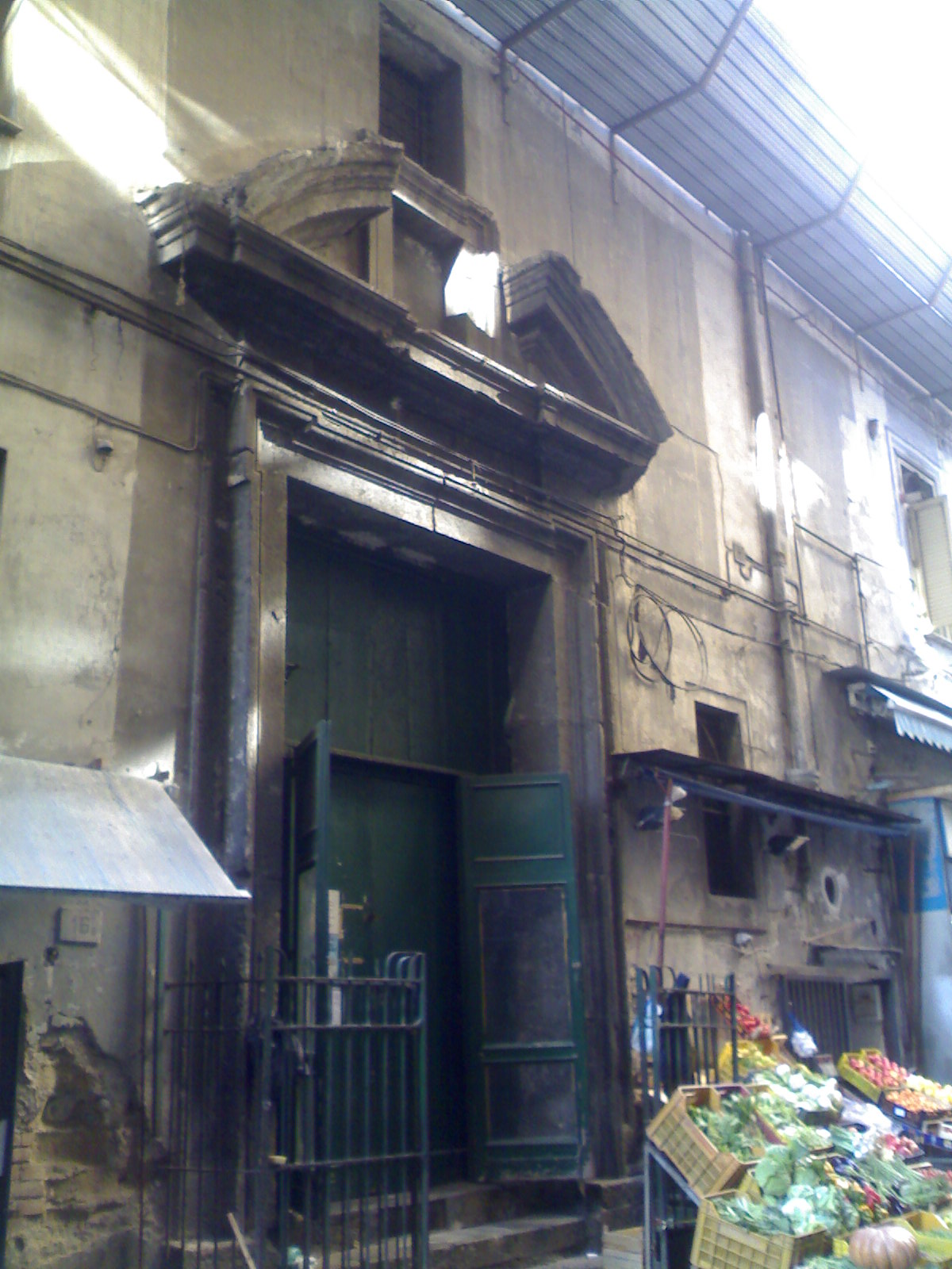 Chiesa di Santa Maria del Presidio (Napoli)